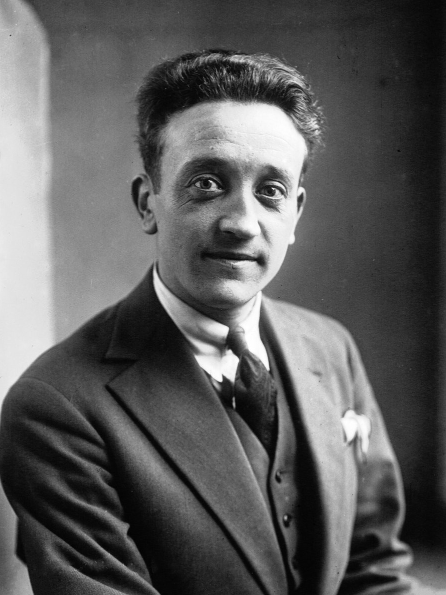 Le pesage du Tour de France : Marcel Gobillot : [photographie de presse] / Agence Meurisse